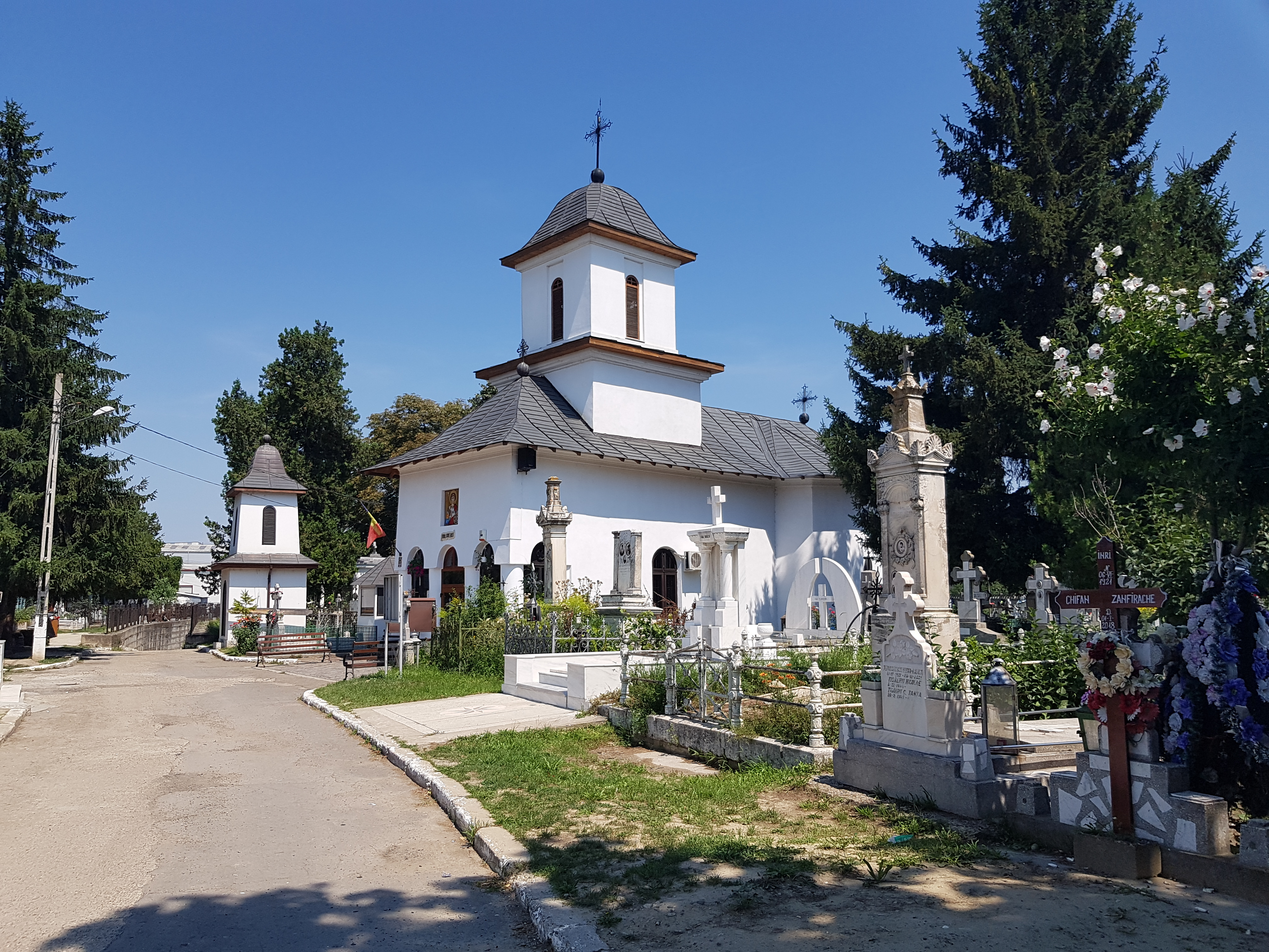 Biserica „Sf. Gheorghe” - Sud